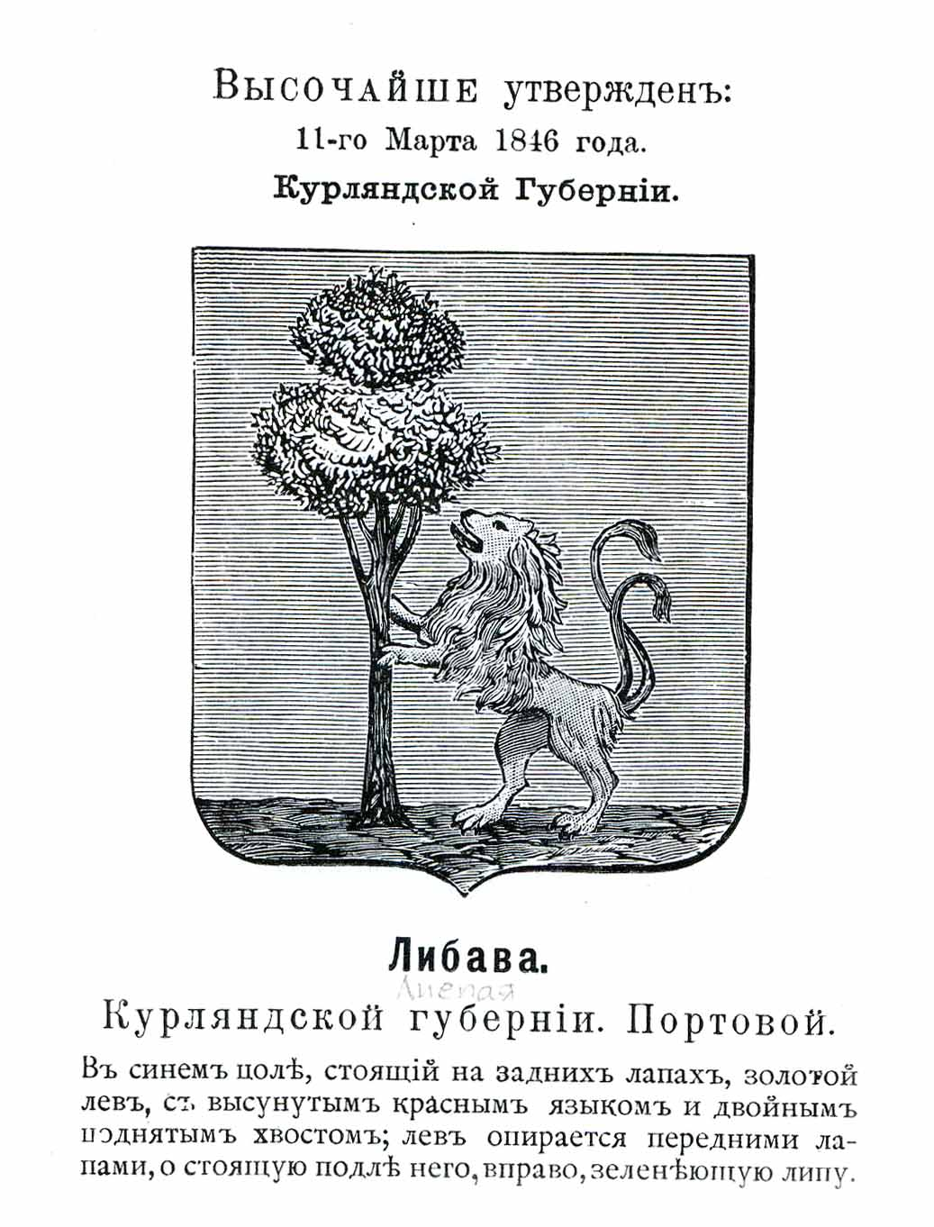 Official Russian Empire coat of arms Libava (Kurlandia Governorate). Герб Российской Империи портового города Либава (лат. Лиепая) Курляндской губернии с официальным описанием в Гербовнике Винклера.